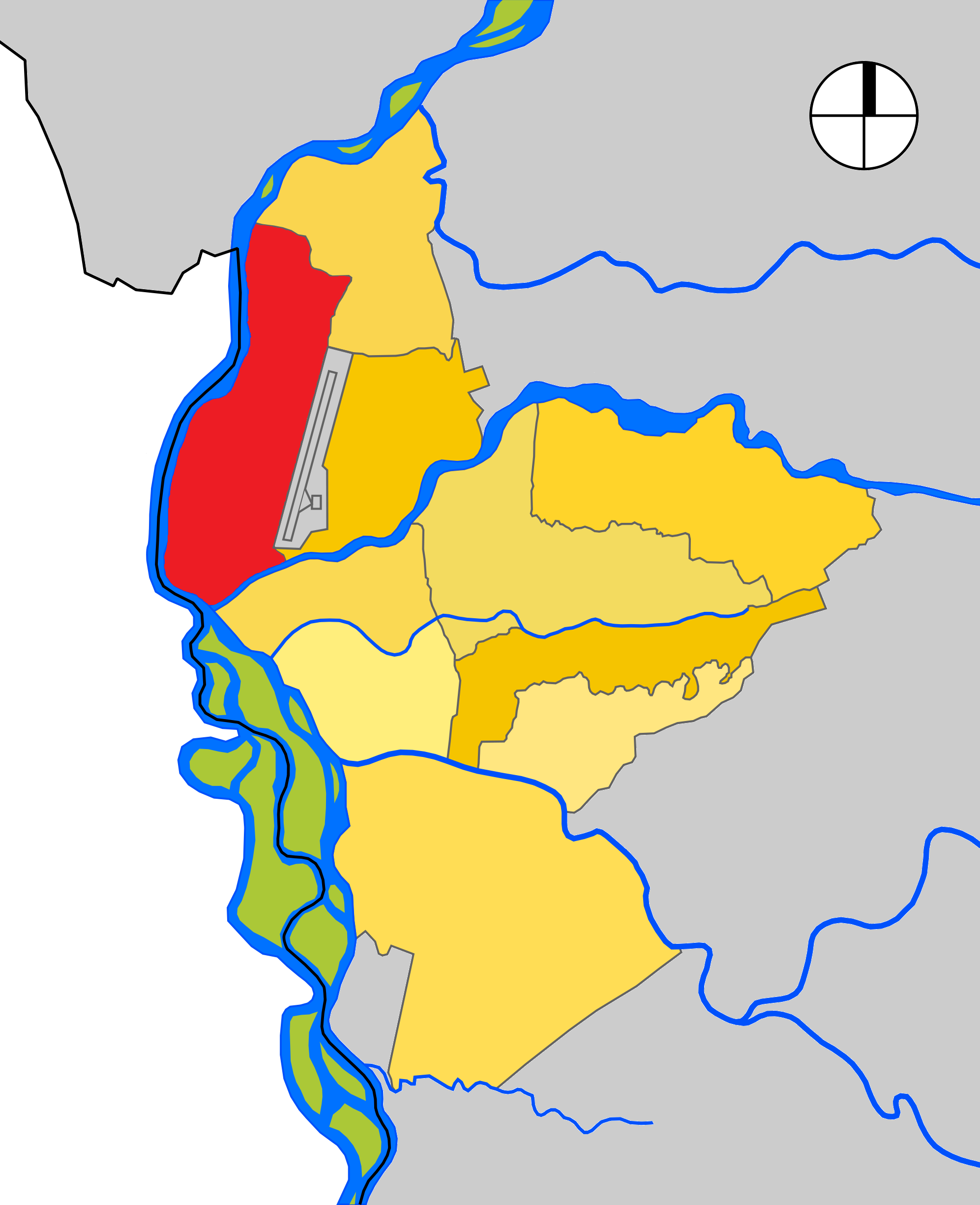 Mapa de las Comuna 1 de Neiva, departamento del Huila, Colombia.